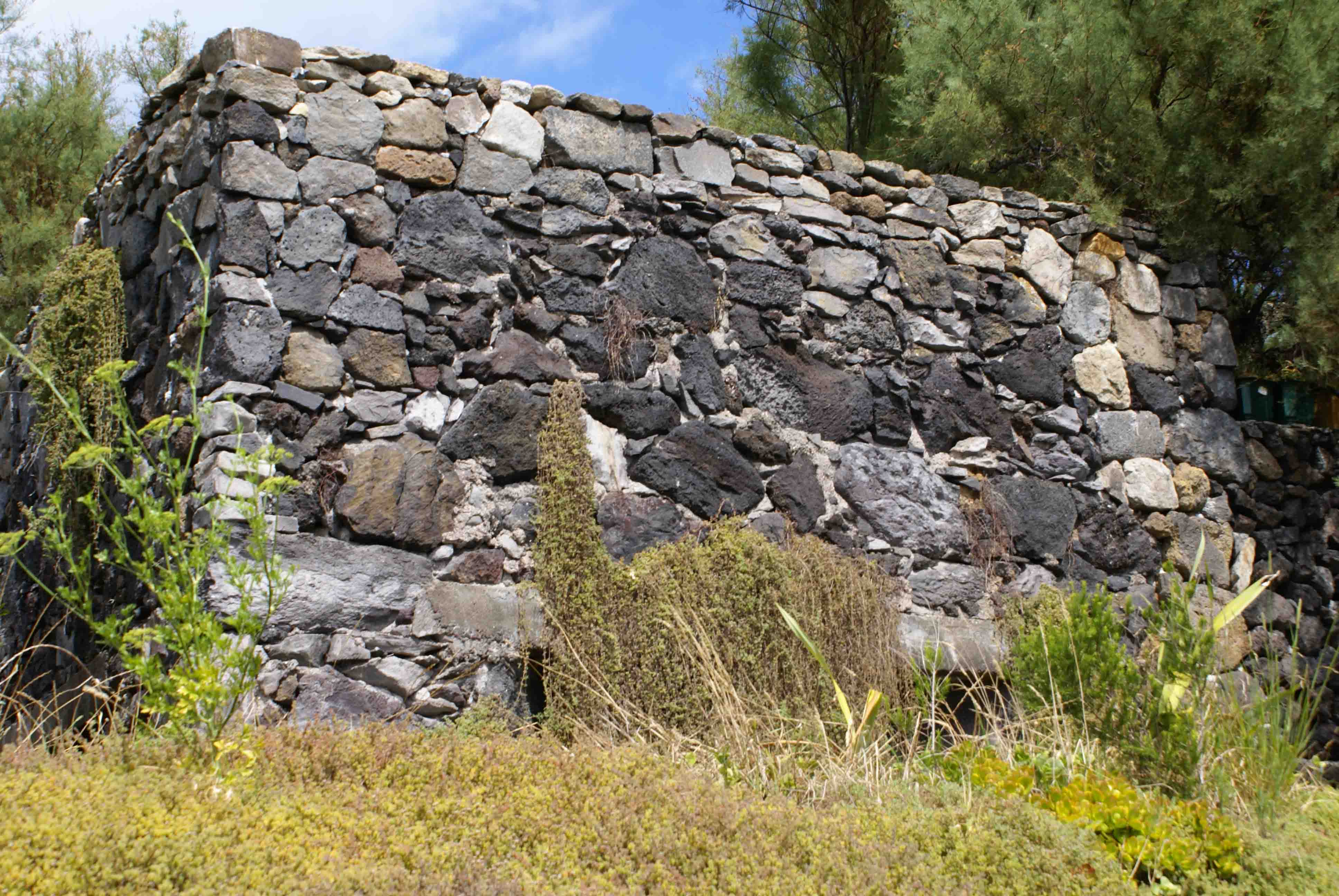 Resto de uma Vigia da Baleia próxima da Costa da Baía de Vila Maria, ilha Terceira, Açores, Portugal